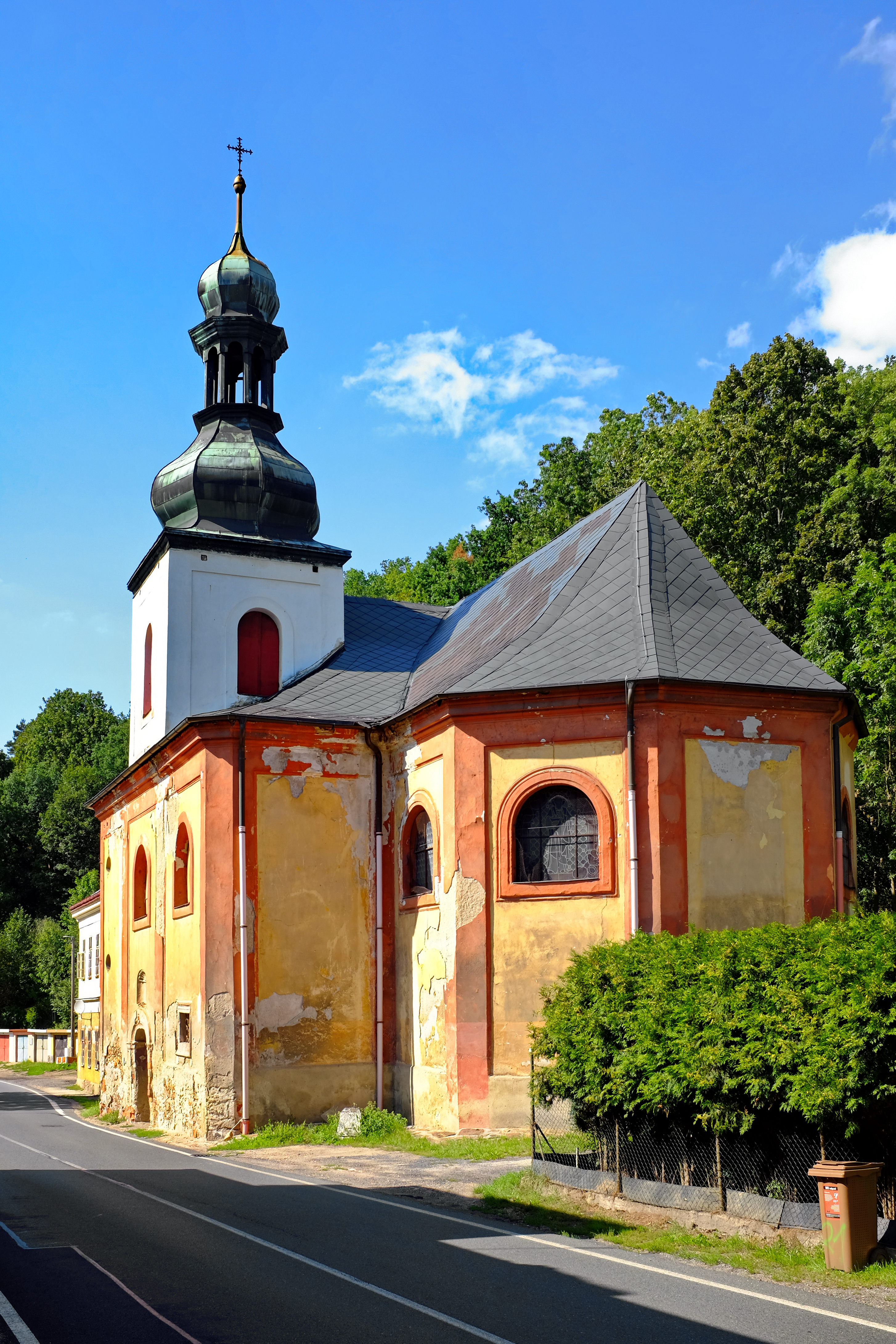 Kostel svaté Anny, Nové Město, st. 32, Horní Slavkov.